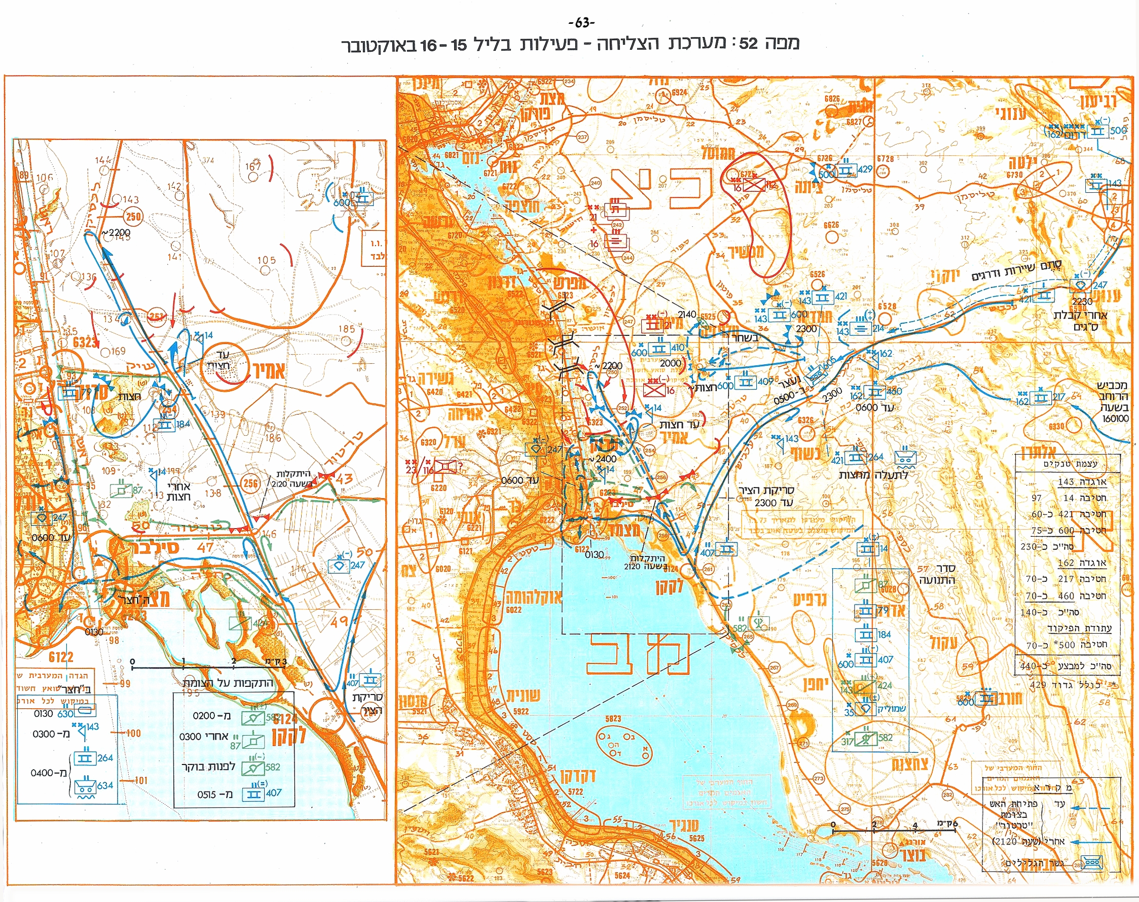 אטלס מלחמת יום הכיפורים. מפה 52 - מערכת הצליחה - פעילות בליל 15-16 לאוקטובר - מלחמת יום הכיפורים